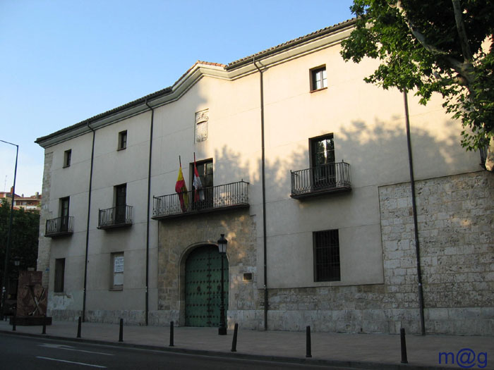 Valladolid – España (Spain) - Real Chancillería - Biblioteca Reina Sofía: Fue construido a mediados del siglo XV para Alonso Pérez de Vivero. A finales del mismo siglo se ubicó en el edificio el Tribunal de Justicia. En la estancia llamada Sala Rica, el 14 de octubre de 1469, se celebró el matrimonio de los Reyes Católicos. Posteriormente pasó la propiedad del palacio a la Corona y se habilitó para Chancillería. En 1562 por orden de Felipe II se construye junto al palacio un edificio para el archivo del Supremo. En la actualidad todo el conjunto alberga la Biblioteca Universitaria Reina Sofía y la Casa del Estudiante, propiedad de la Universidad de Valladolid.